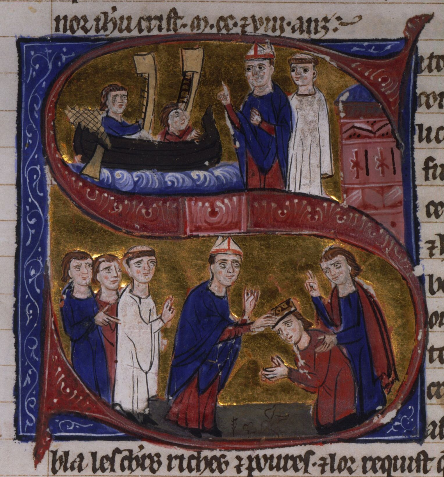 Arrivée de Jean de Brienne à Acre et couronnement de Jean Ier de Brienne